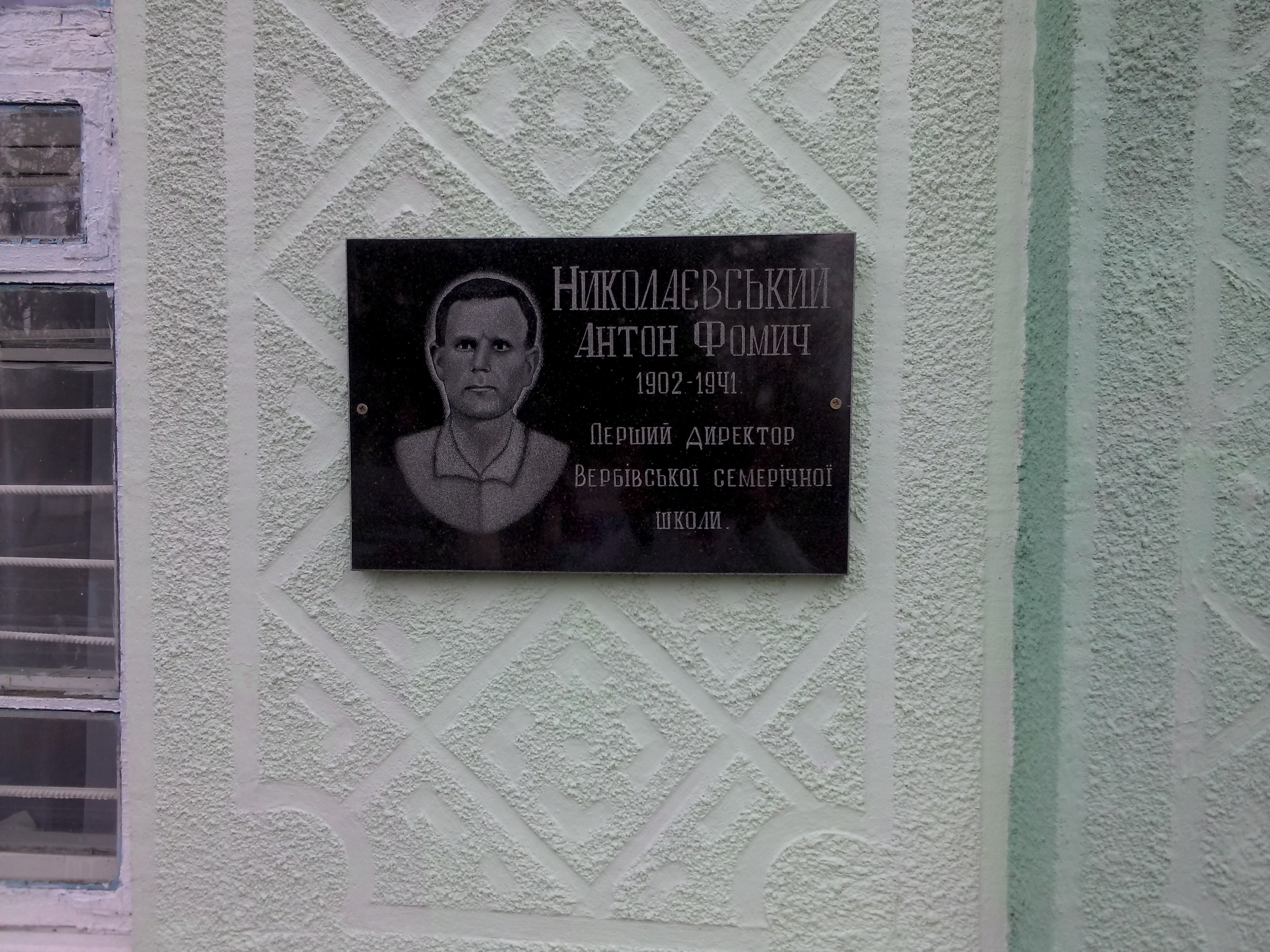 с. Вербівка. Меморіальна дошка першому директорові школи Николаєвському А.Ф.